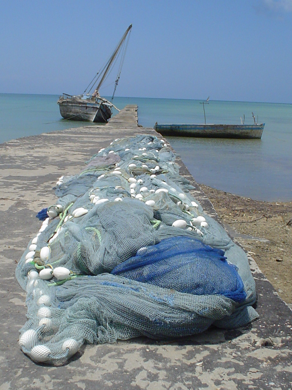 Wharf at Mkoani. Havenpier in Mkoani, Pemba, Tanzania